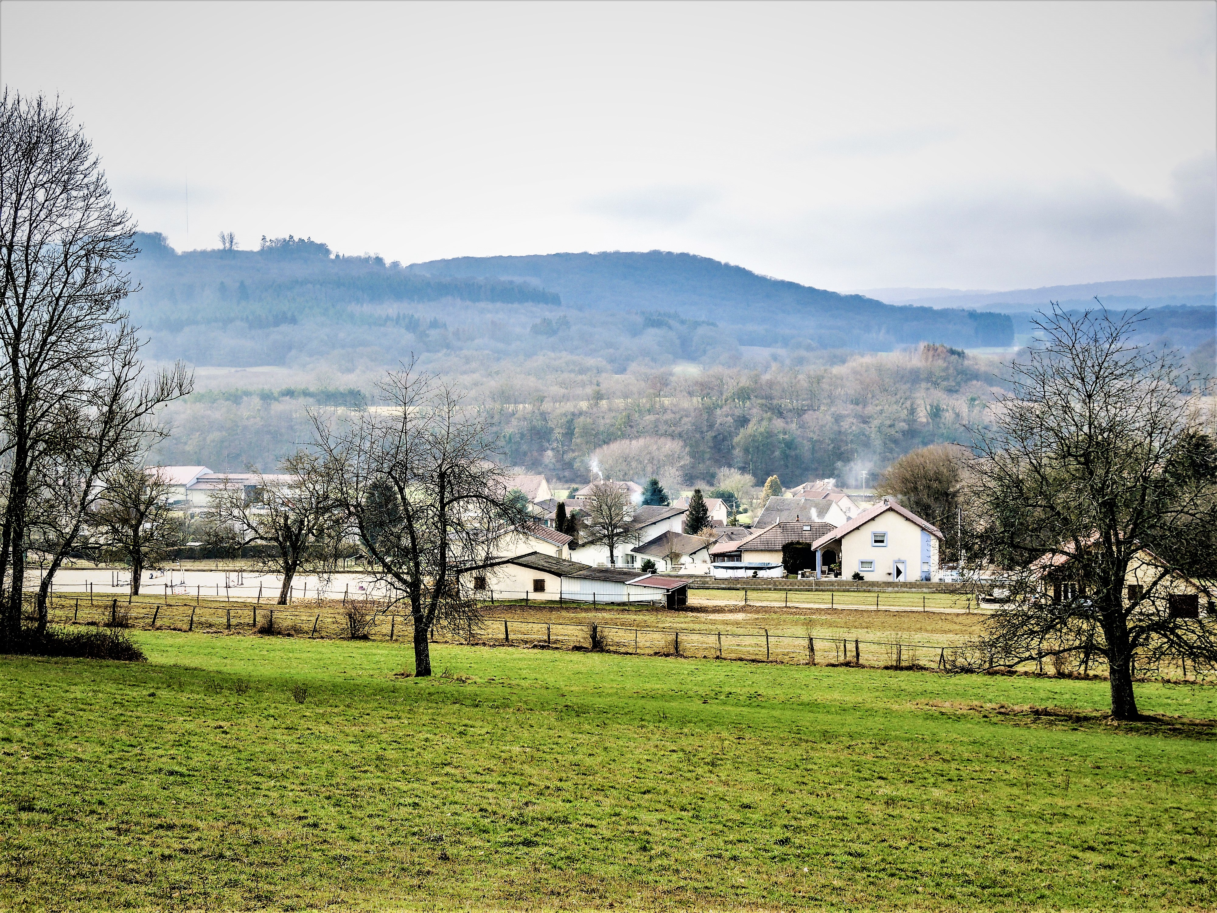 Panorama sur le village de Faimbe